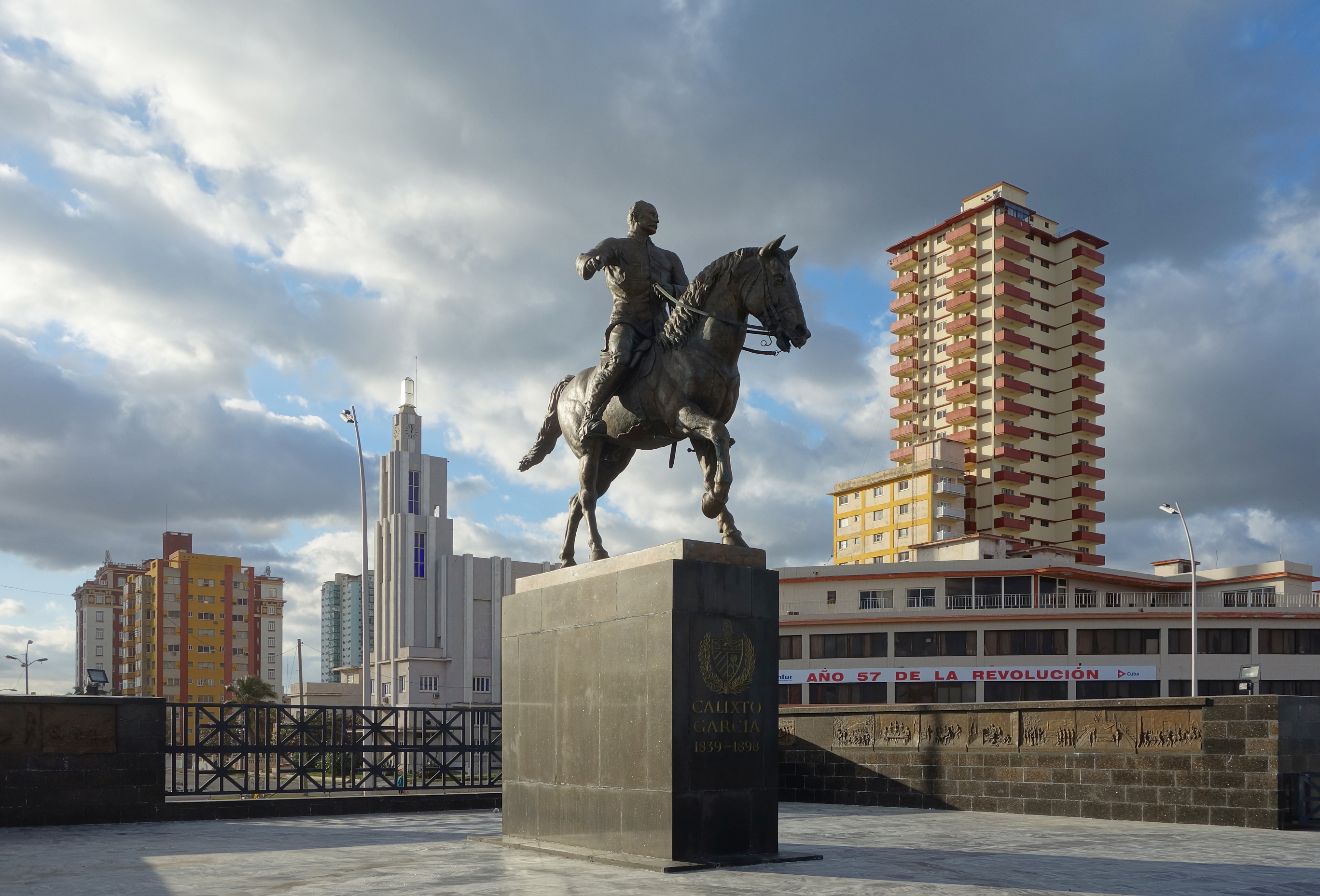 Mémorial à Calixto Garcia sur le Malecon à La Havane.